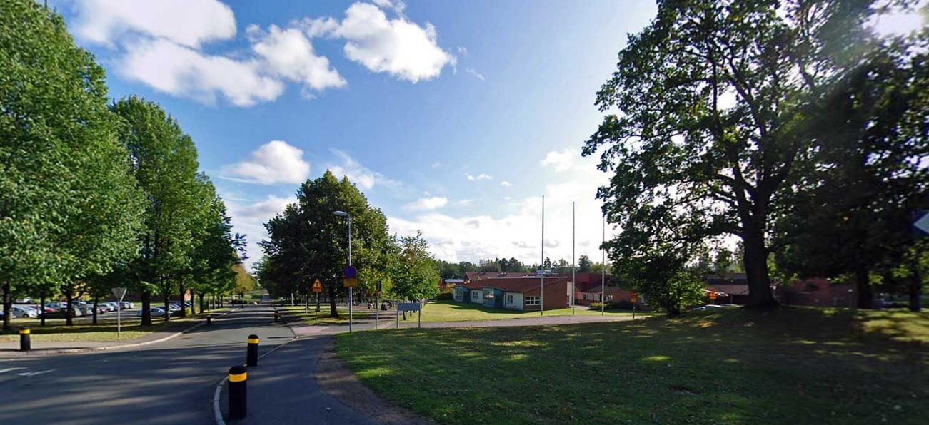 Kavelbrogymnasiet i Skövde